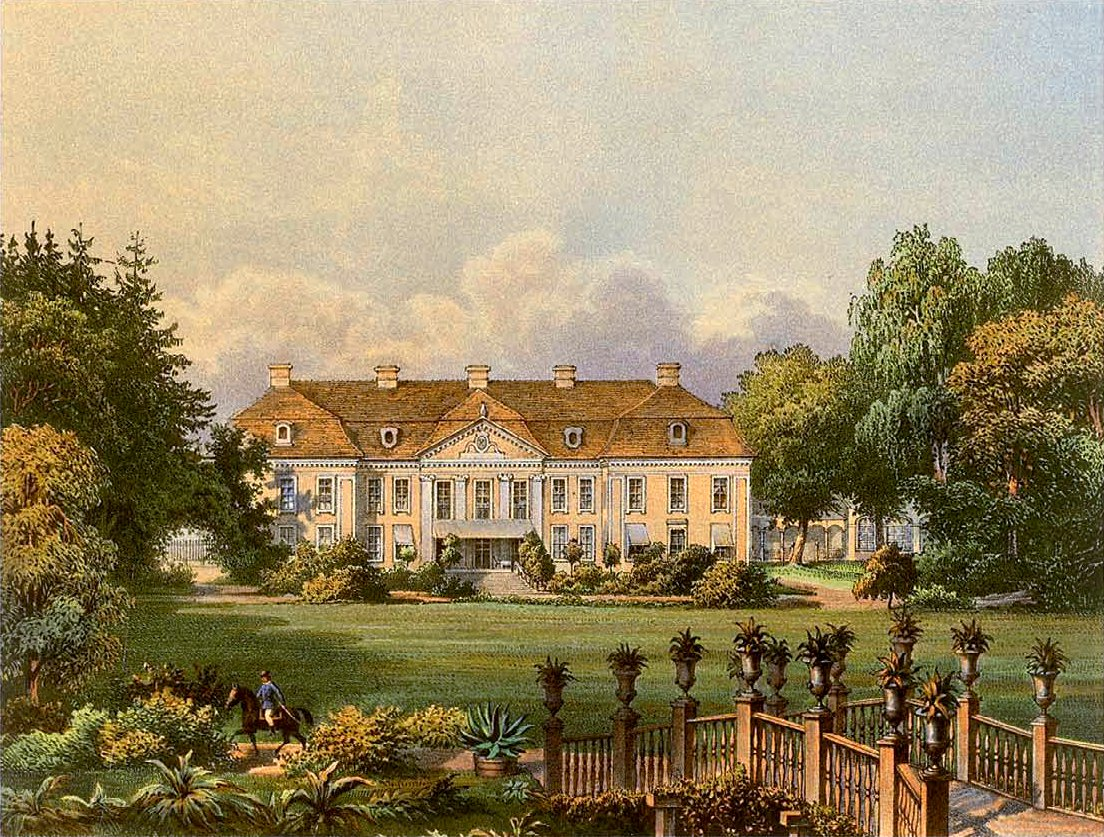 Schloss Schlodien, Kreis Preußisch Holland, Provinz Preussen